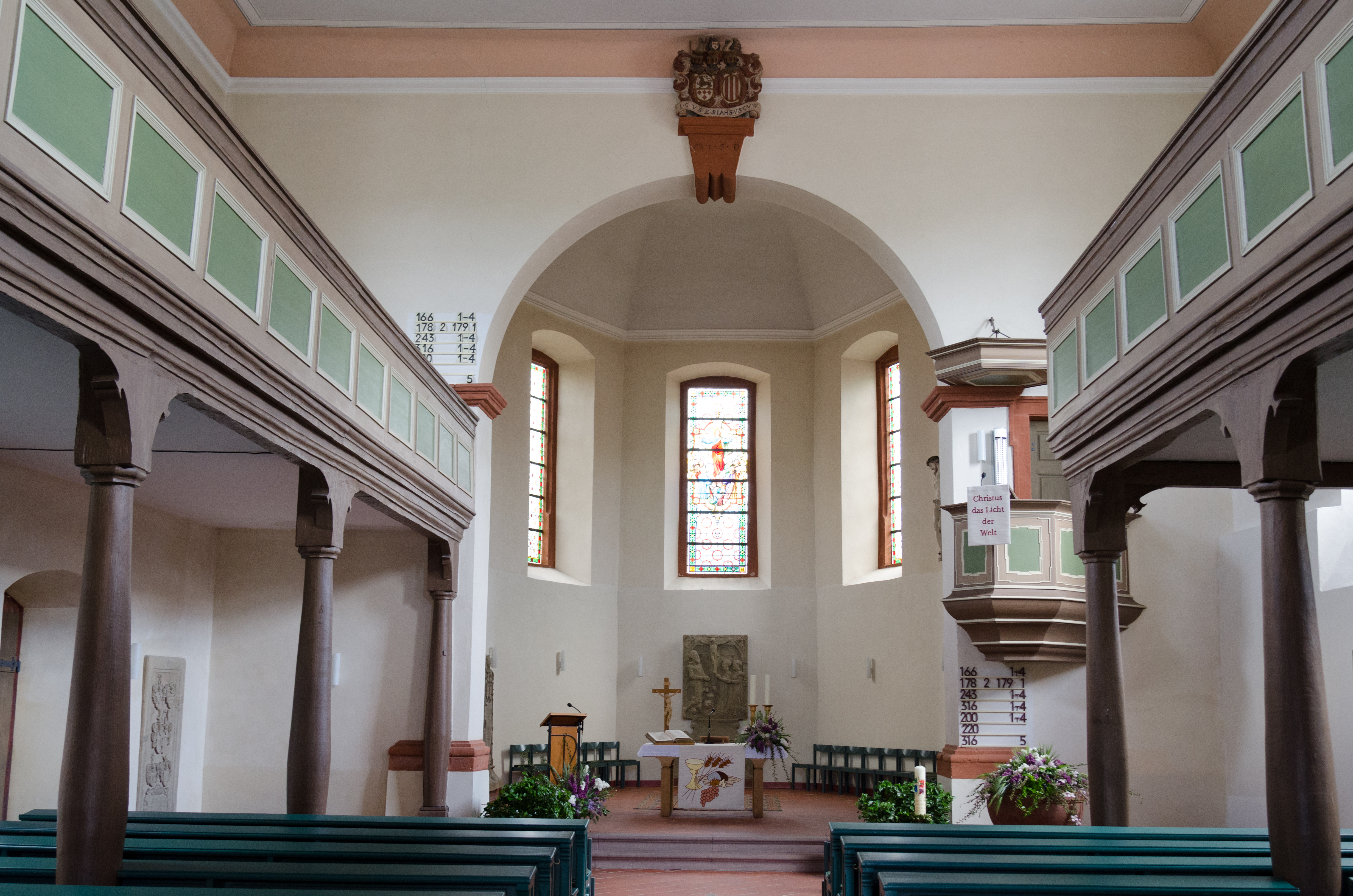 Karsbach, Höllrich, Bonnländer Straße 35, Ev. Pfarrkirche